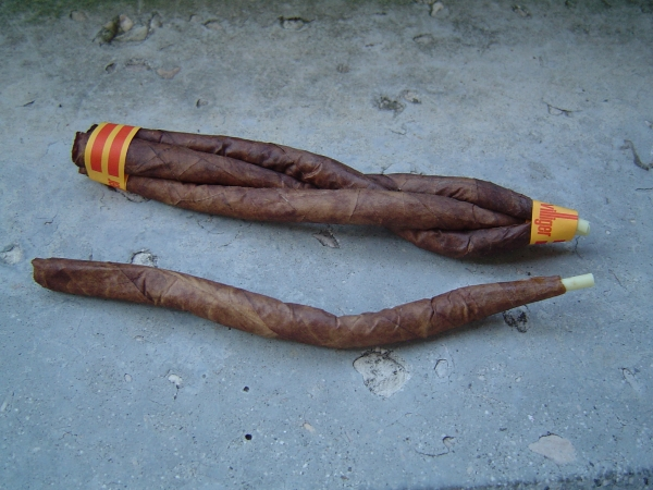 Virginia-Zigarren, von Hand gezöpfelt